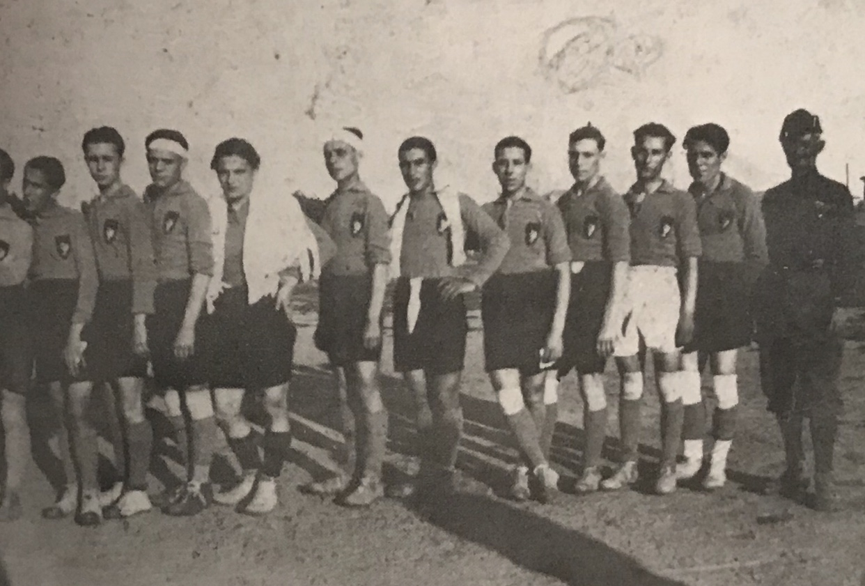 Rara immagine dell'epoca rappresentante la formazione della GSF Badiese nel 1928